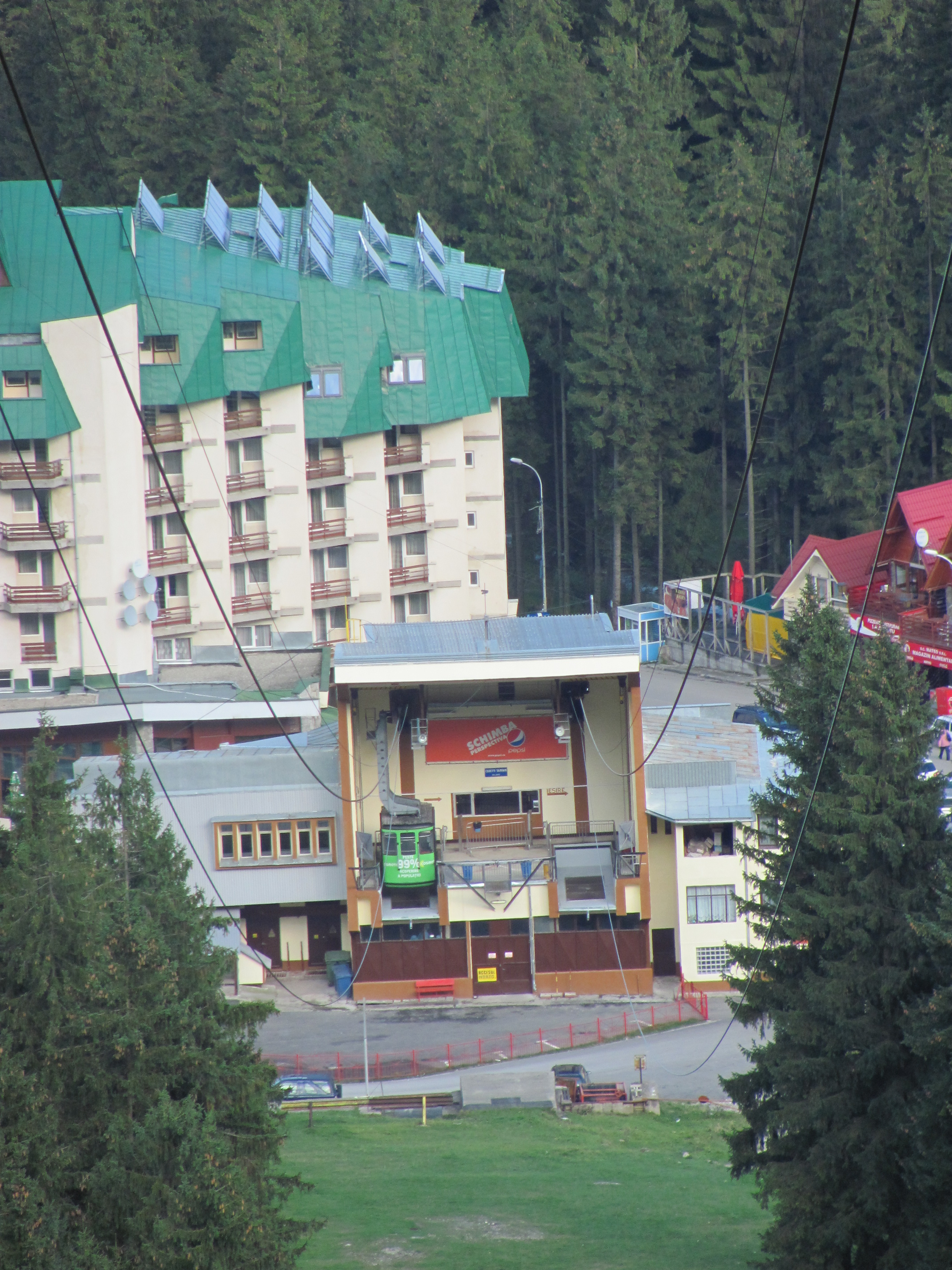 Stație telecabina Bușteni-Babele de la prmul stâlp